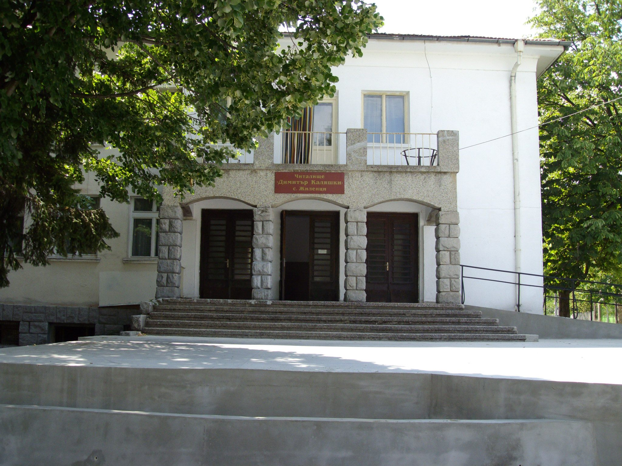 Народно читалище „Димитър Каляшки-1920“, село Жиленци